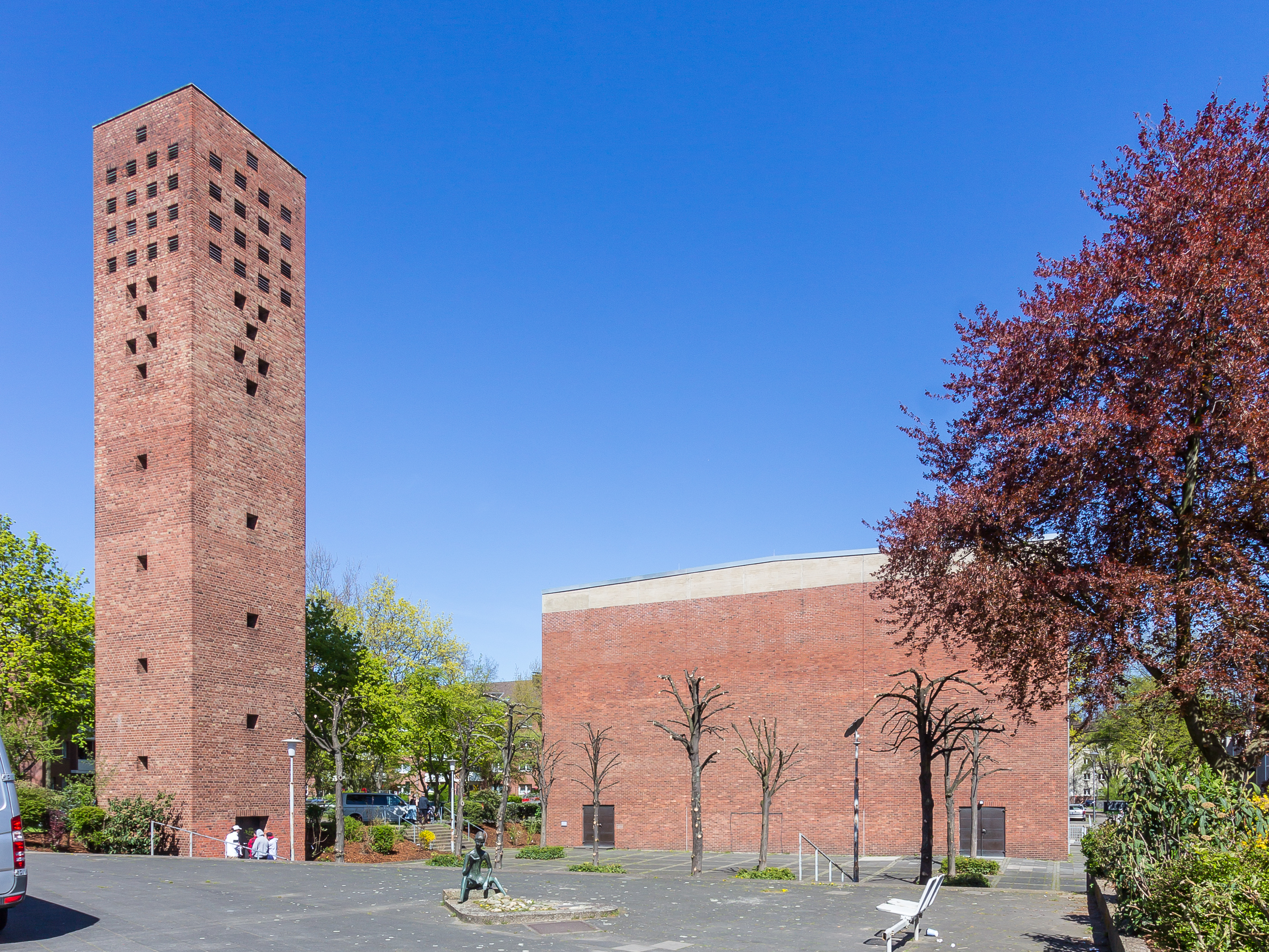 St. Bartholomäus, Köln-Ehrenfeld This is a photograph of an architectural monument.